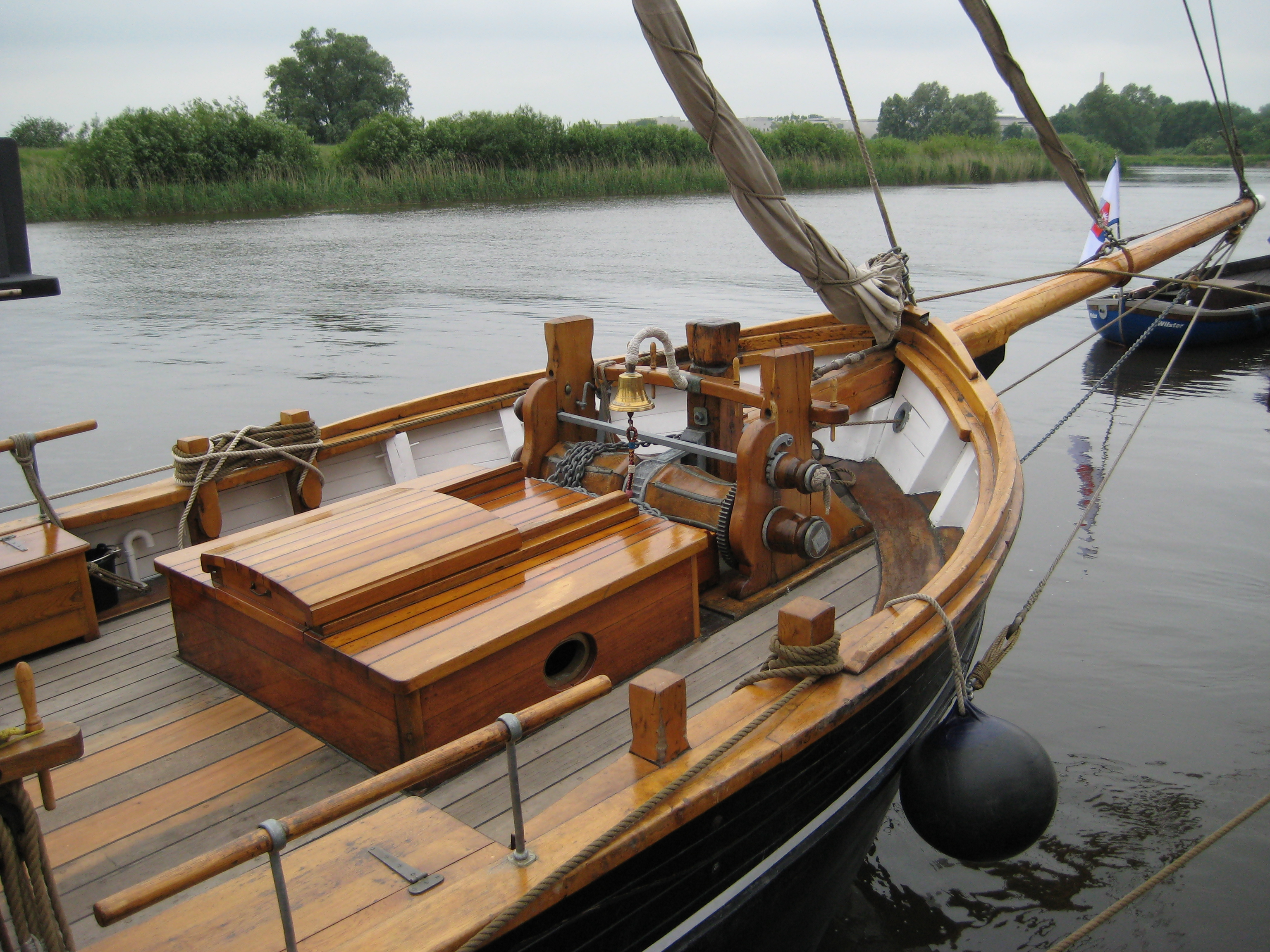 Das älteste fahrtüchtige Segelschiff Deutschlands, die Rigmor von Glueckstadt, Störschipperfest Itzehoe